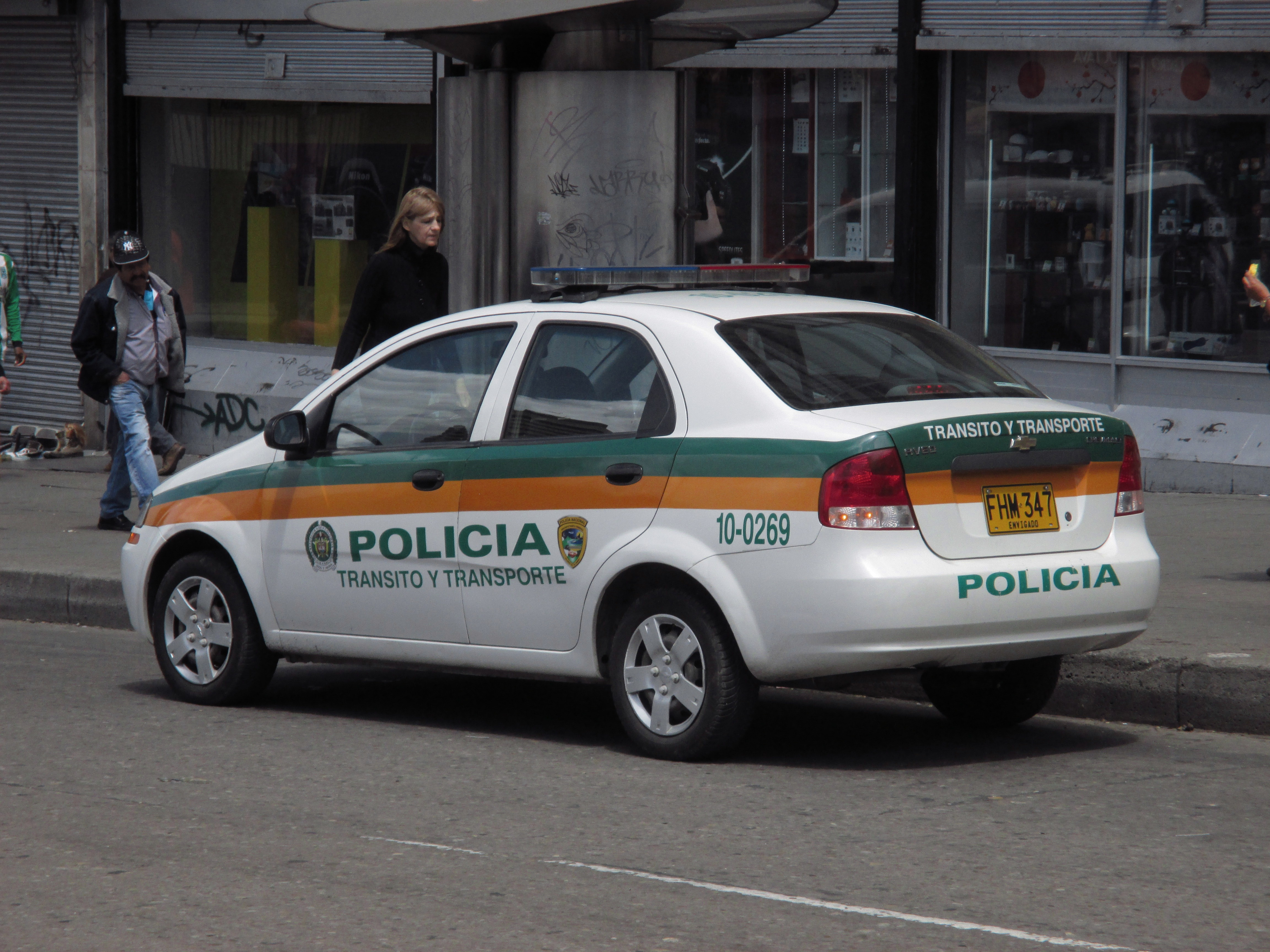 Carro de Policía